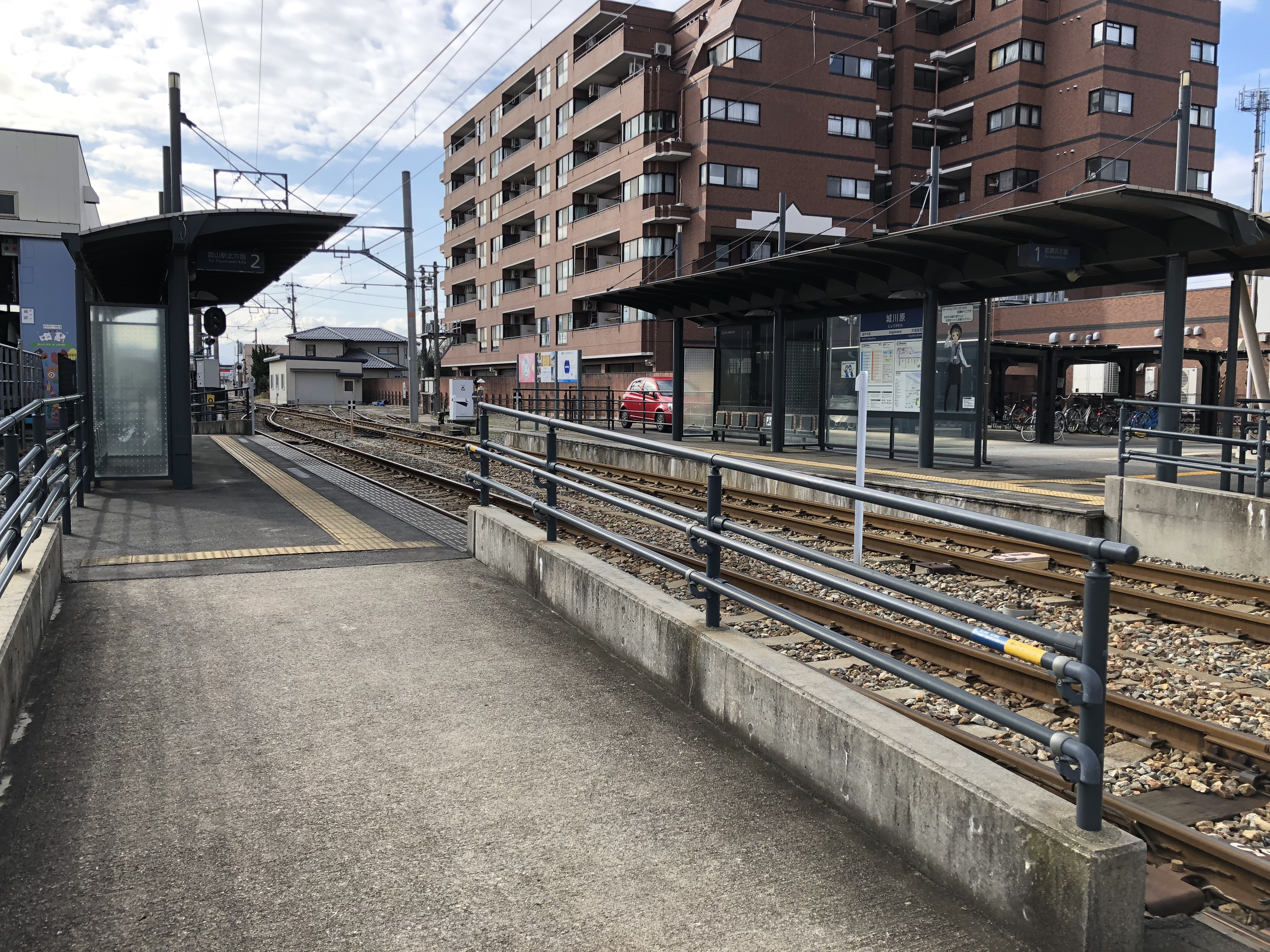 富山ライトレール富山港線城川原駅